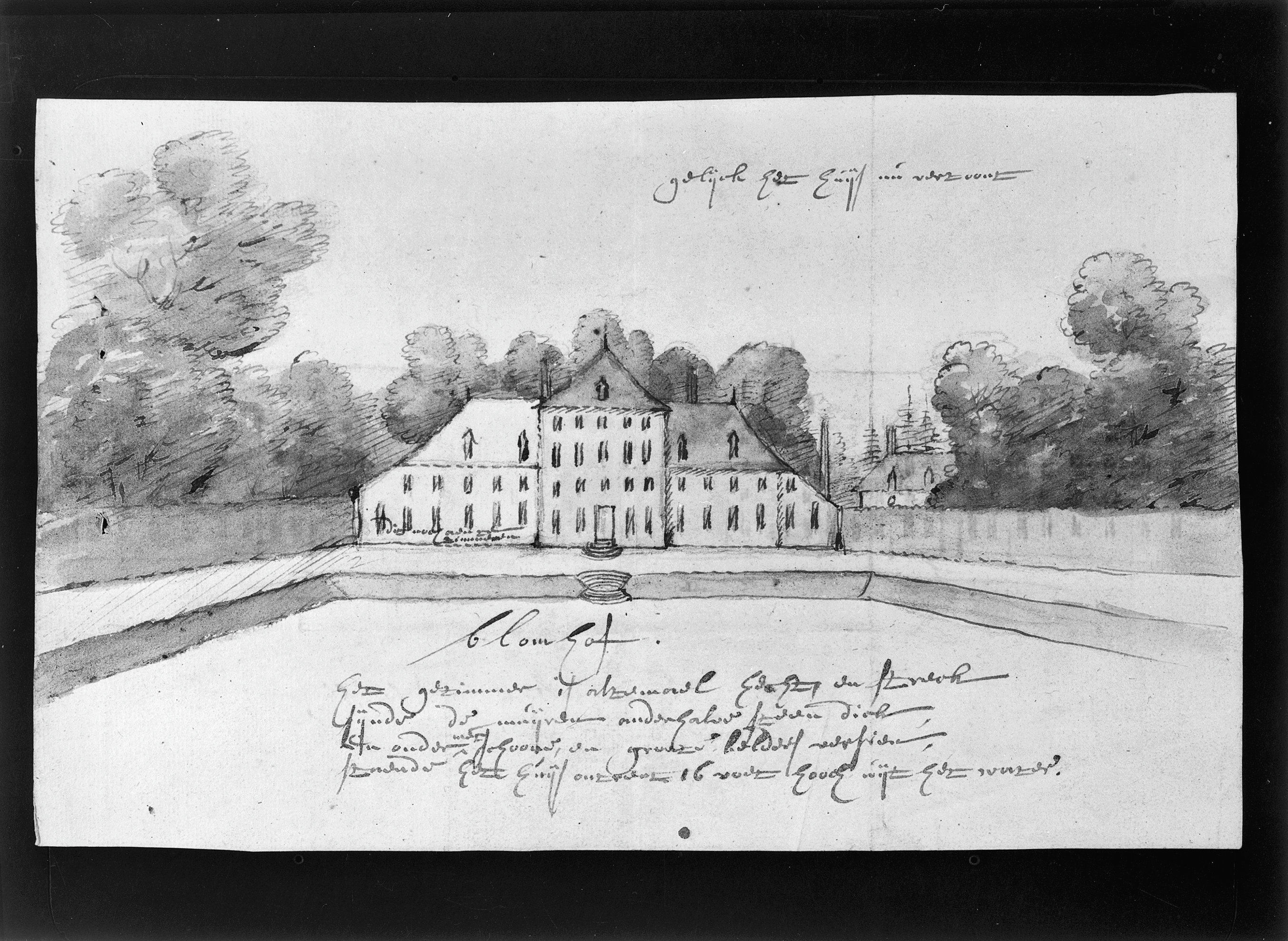 Huis Randenbroek: tekening voorzijde